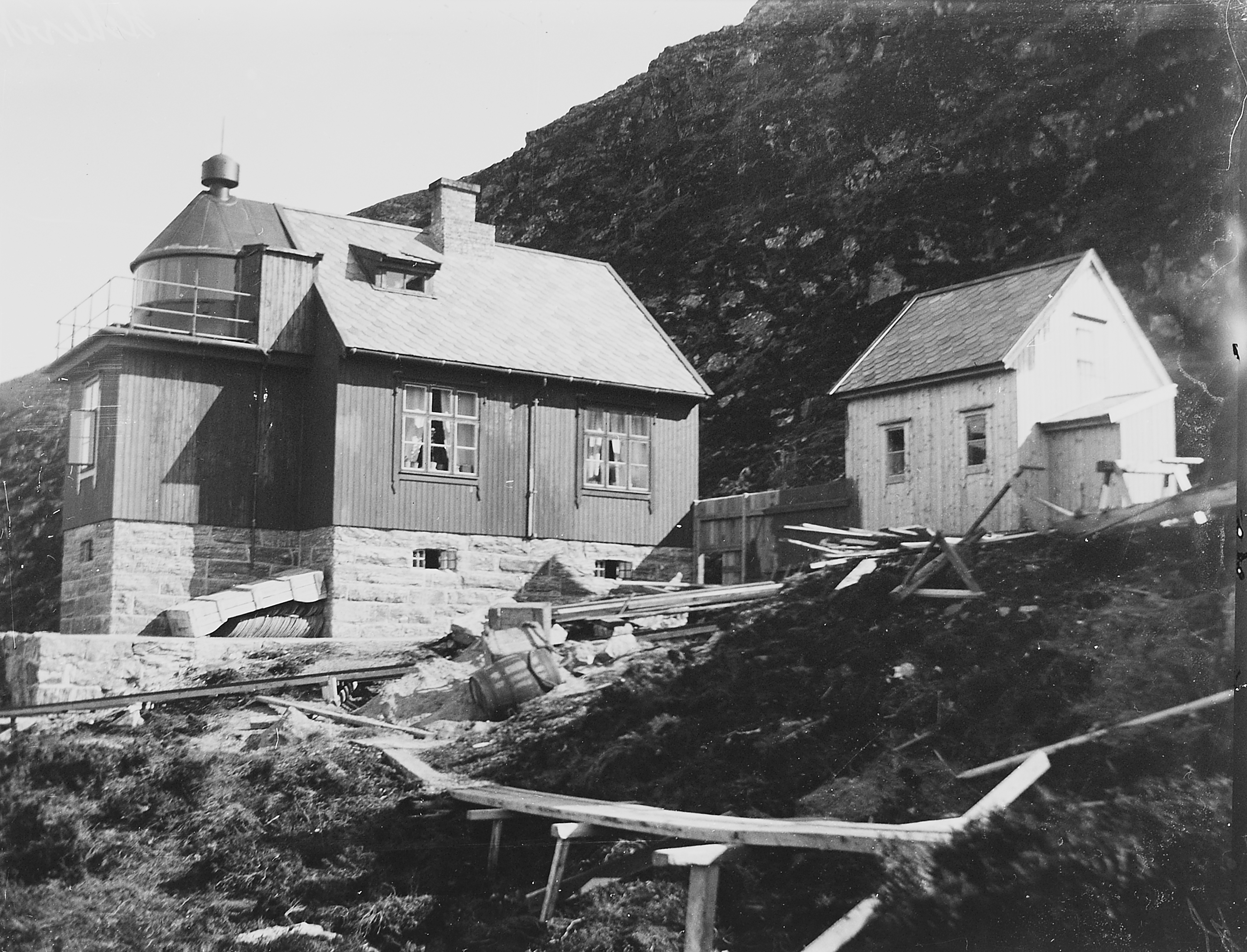 Bildet er hentet fra Arkivverket. Hellevik, Haram Arkivinstitusjon : Riksarkivet Arkivnavn : Fyrdirektoratet Sted : Norge, Møre og Romsdal, Haram, Emneord: Fyr, Kyst Avbildet